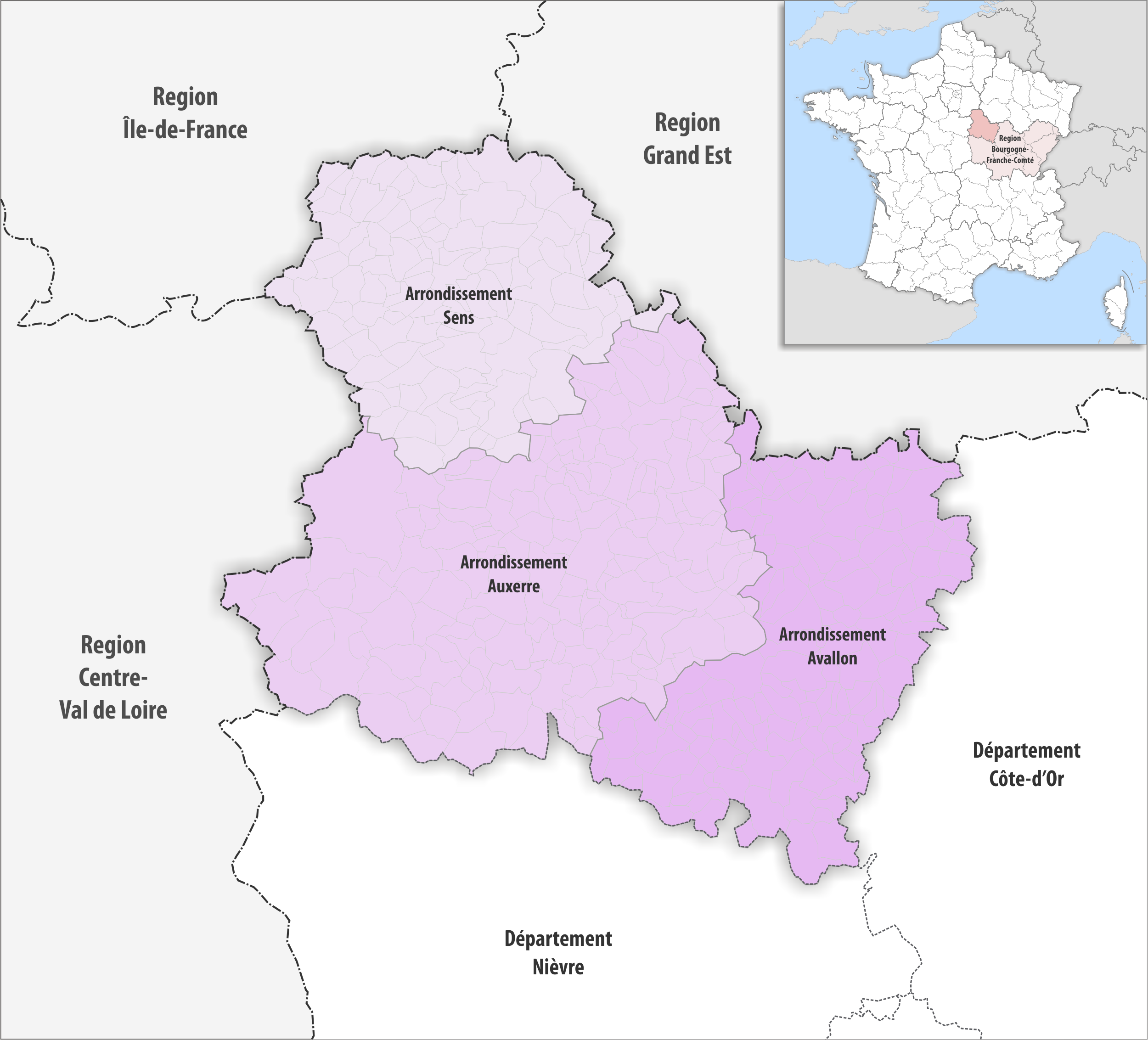 Gemeinden und Arrondissemente im Departement Yonne